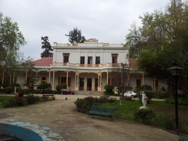 Palacio Ossa This is a photo of a national monument in Chile: 816